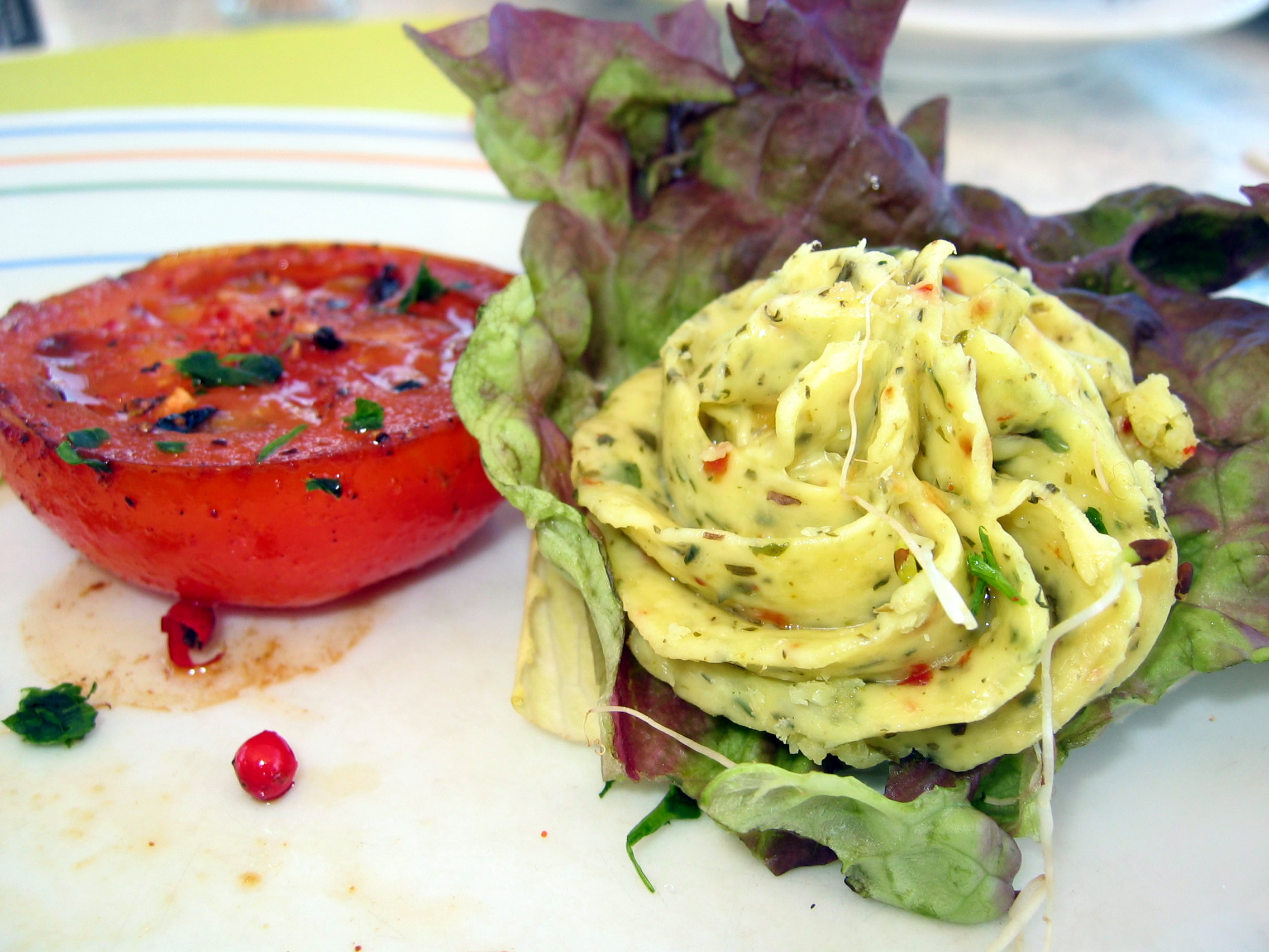 Grilltomate und Kräuterbutter auf einem Salatblatt